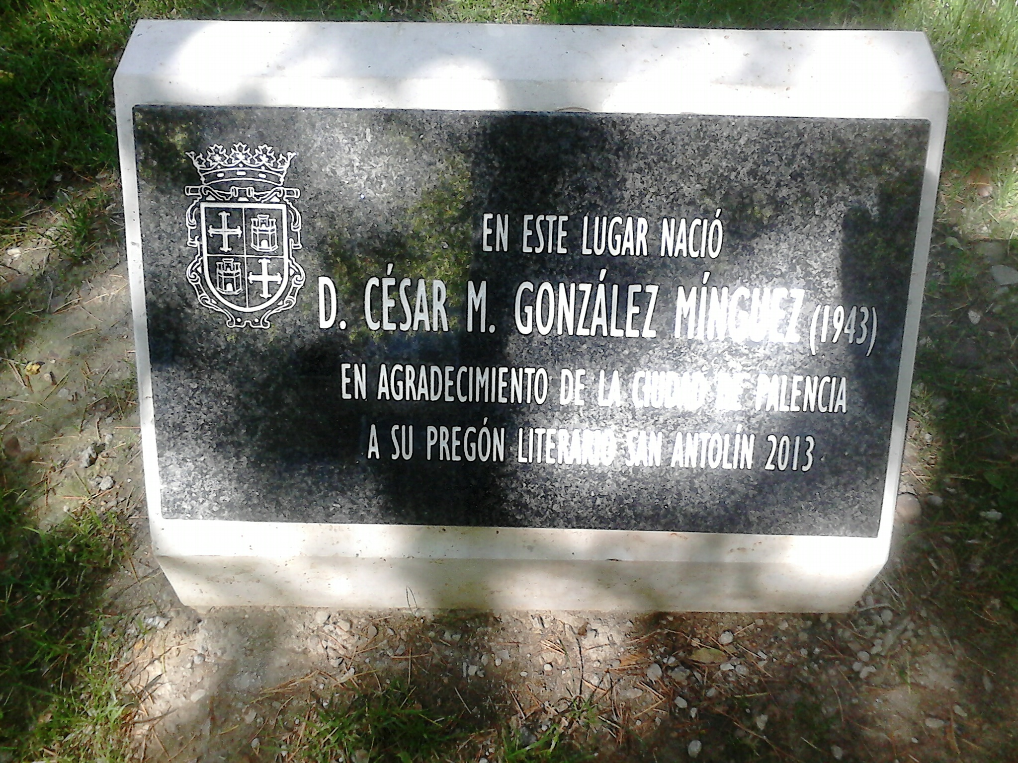 placa colocada en el cesped en 2013